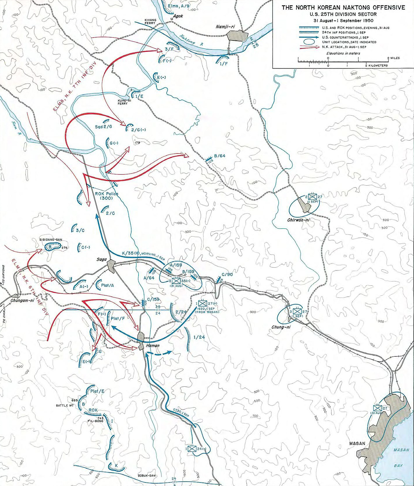 Carte du secteur de la 2e division américaine lors de la Grande offensive du Nakdong correspondant à la bataille de Haman et à la bataille de la rivière Nam.